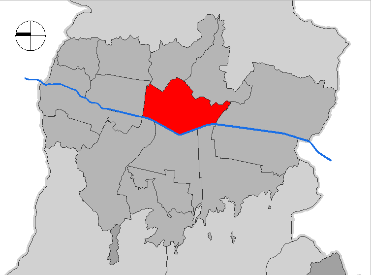 mapa de la comuna La Candelaria. Medellín, Colombia.